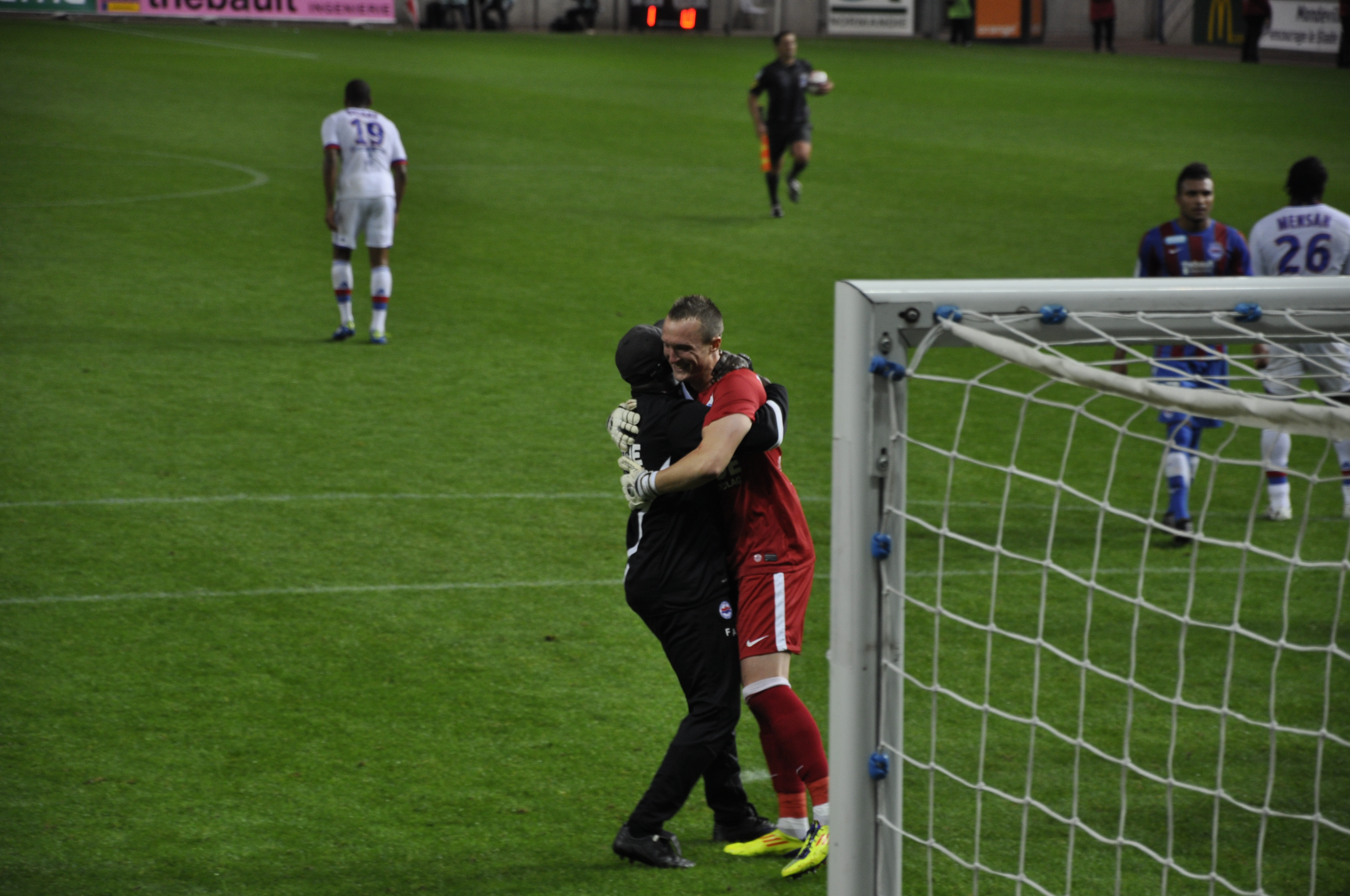 Pape Fall félicite Alexis Thébaux après la victoire de Caen contre Lyon le 21 septembre 2011